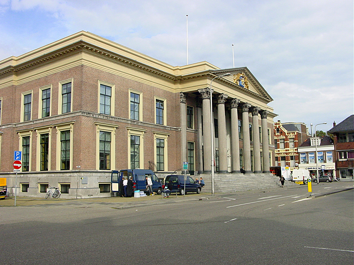 Leeuwarden - Justizpalast